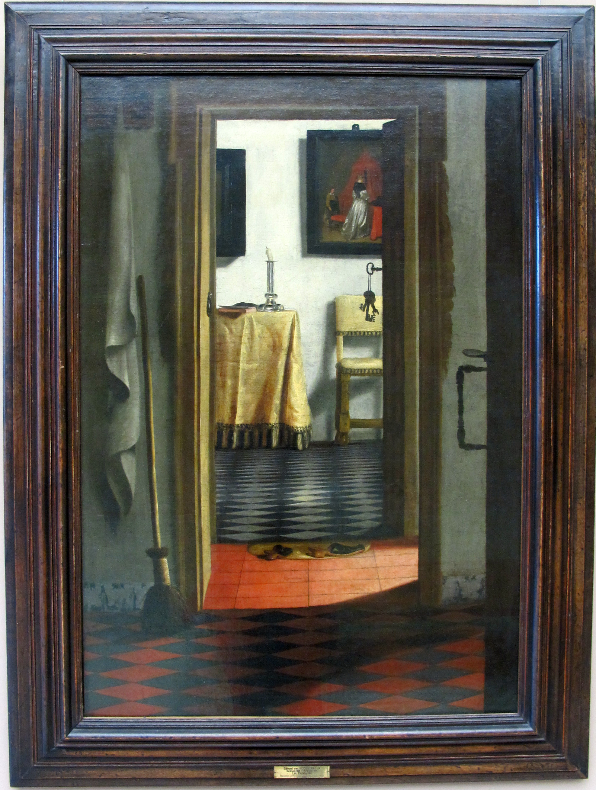 Pittura fiamminga e olandese al Louvre, Parigi